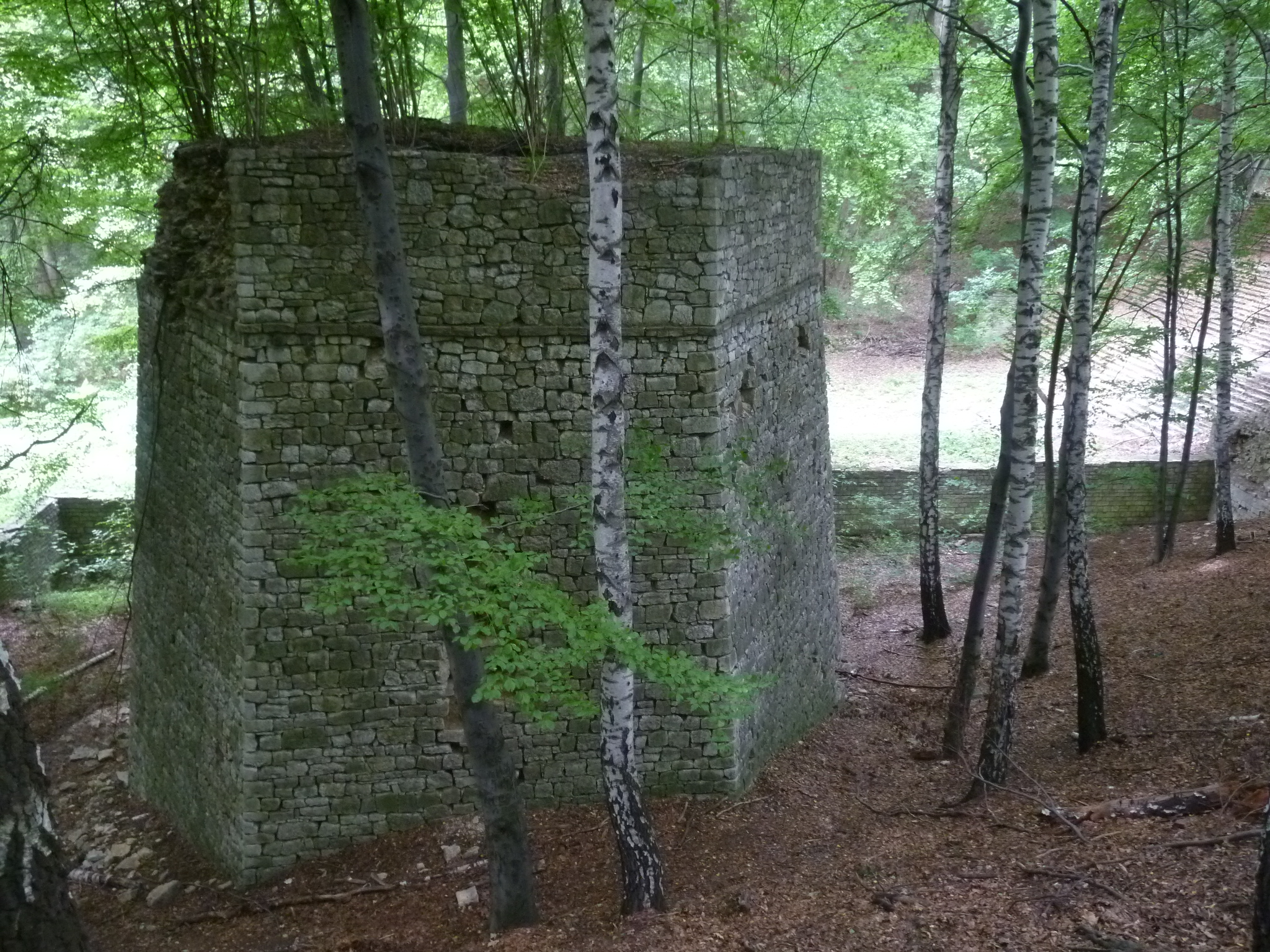 Eingewachsene Reste eines Kalkofens des früheren Kalksteinbruchs. An der Zufahrtsstraße zum Freilichttheater (Feierstätte) auf dem St. Annaberg. Neben diesem befand sich ein zweiter Kalkofen, der wegen seines schlechten Zustandes abgerissen wurde.